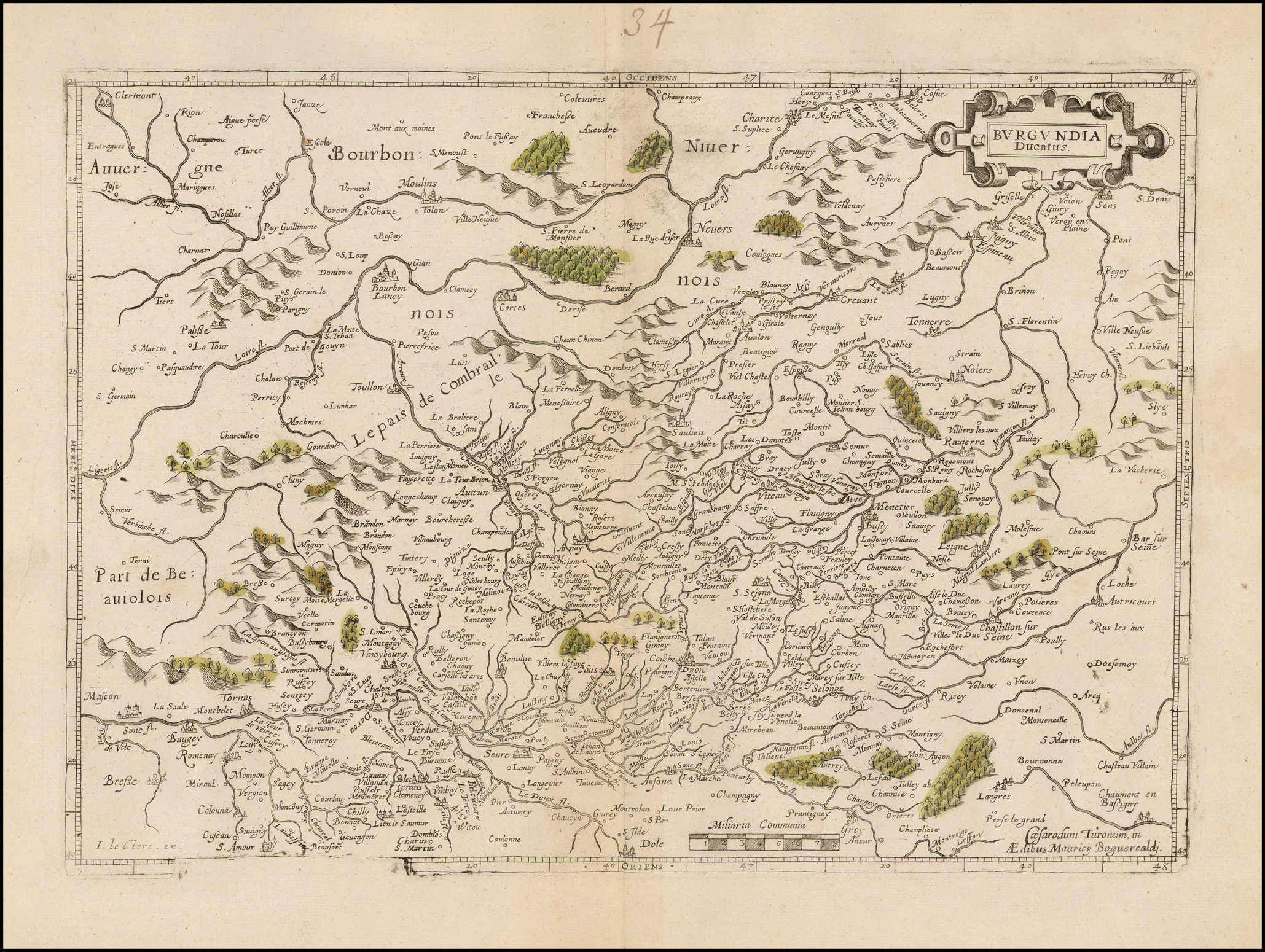 Burgundia Ducatus: Karte des Herzogtums Burgund, kolorierter Stich (1620), Original (1594) von Maurice Bouguereau, von Jean Le Clerc überarbeitet und in seinem Atlas Théâtre geographique du royaume de France (1620–1631) veröffentlicht.